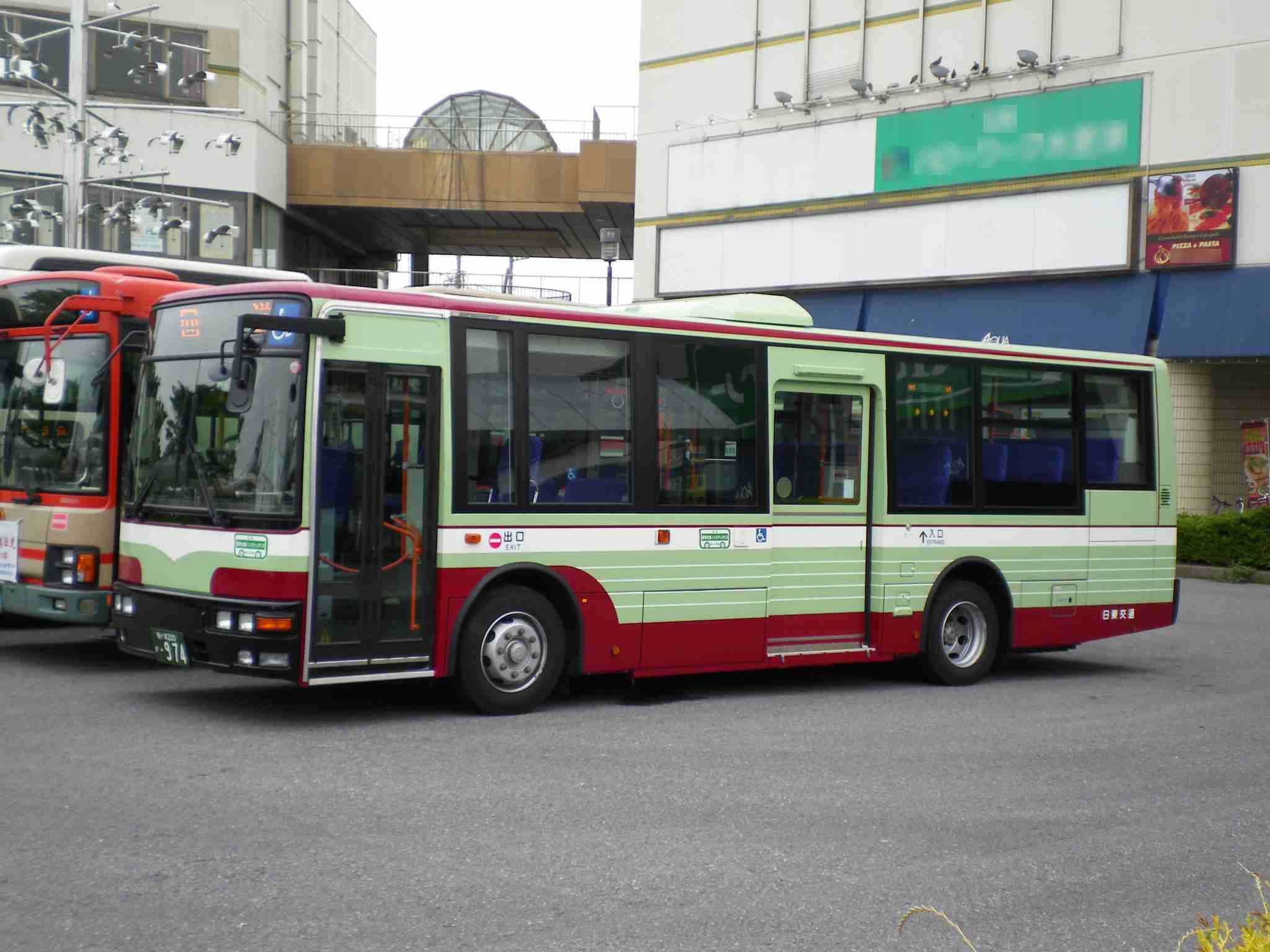 三菱ふそう・エアロミディMK 袖ケ浦200か974 JR木更津駅西口にて撮影